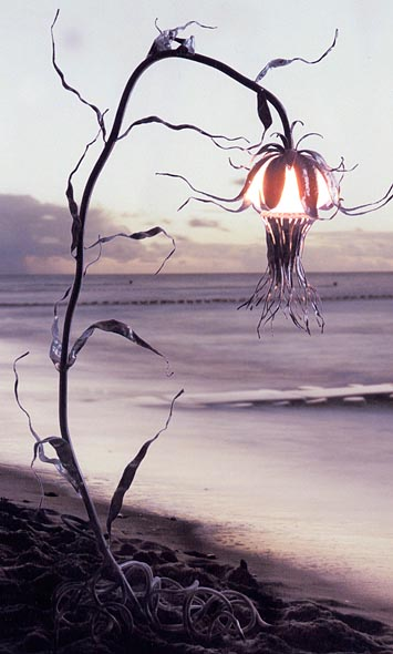 Lampe von Till Fuhrmann Fotograf: Stephan Gustavus